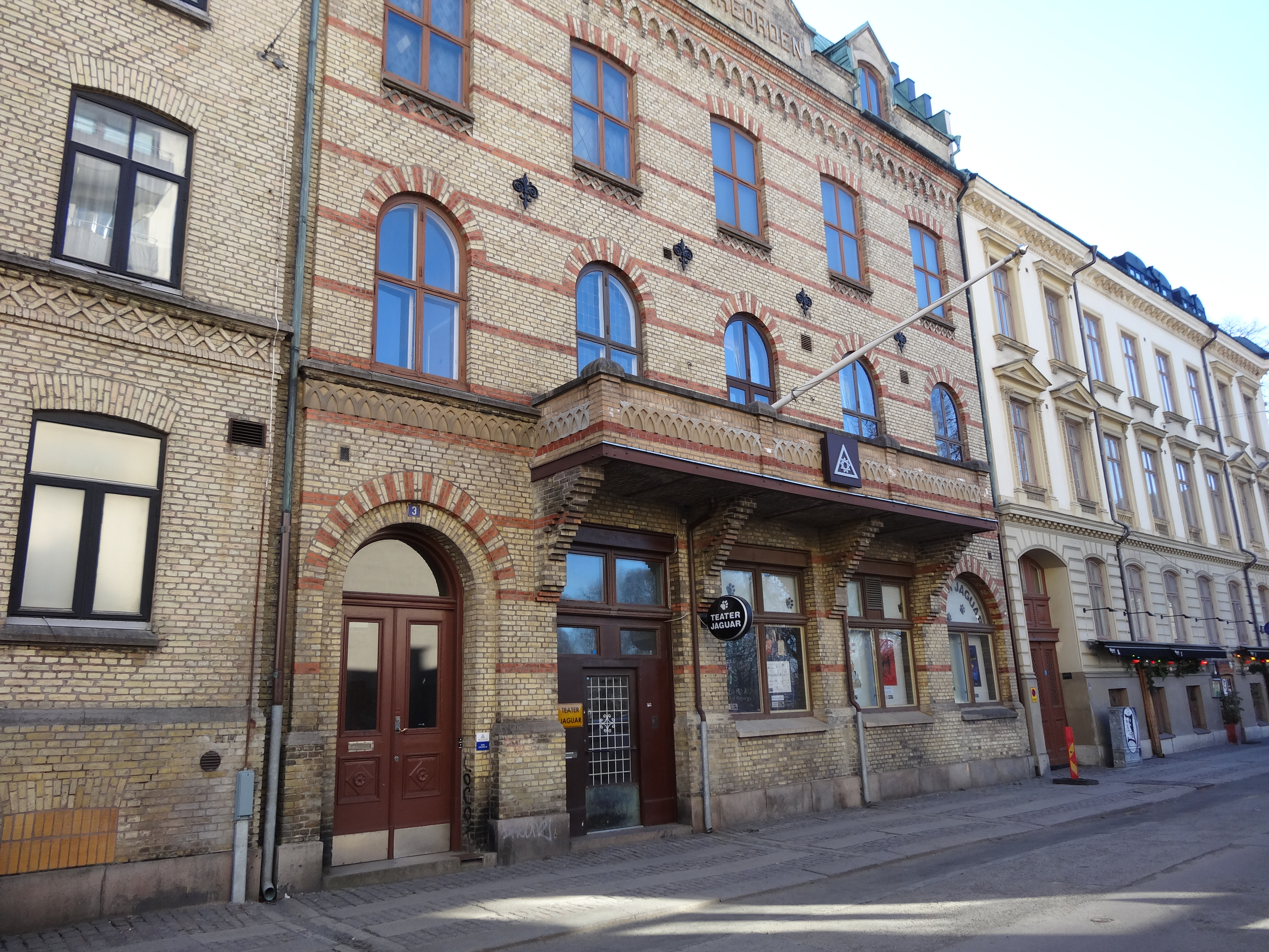 Huset vid Storgatan 3 i stadsdelen Vasastaden i Göteborg byggdes 1870 för Kjellbergska flickskolan.